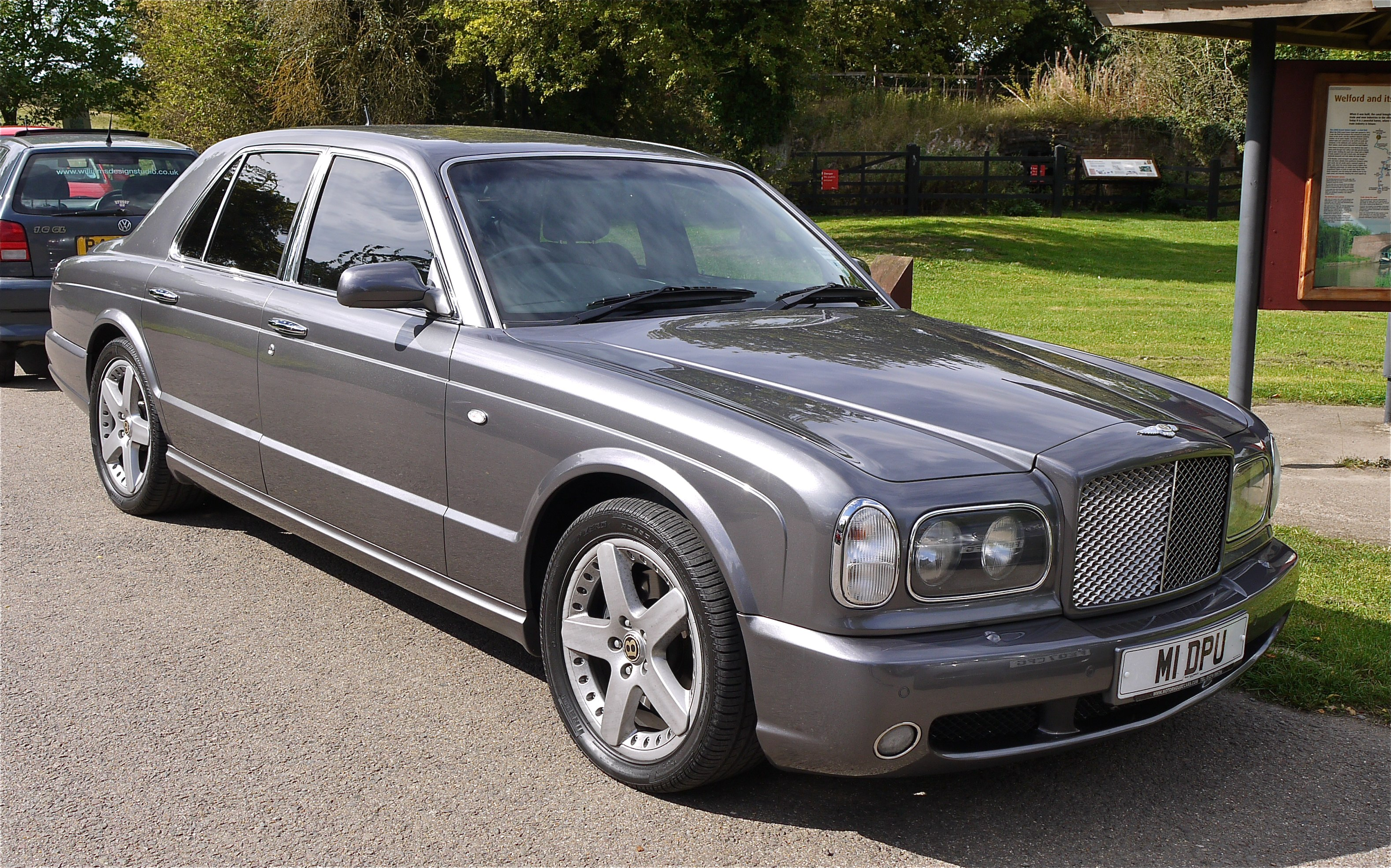 Panasonic G1 14-45 Lens